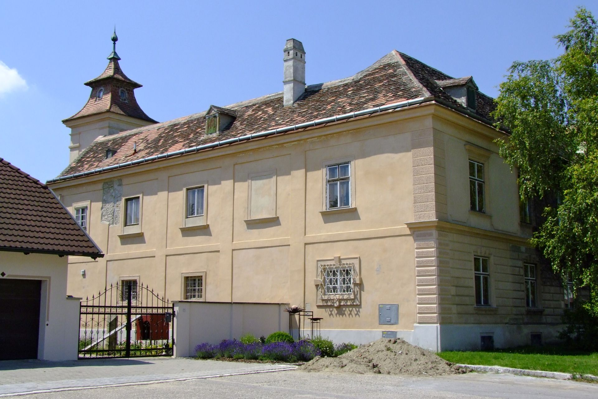 Schloss